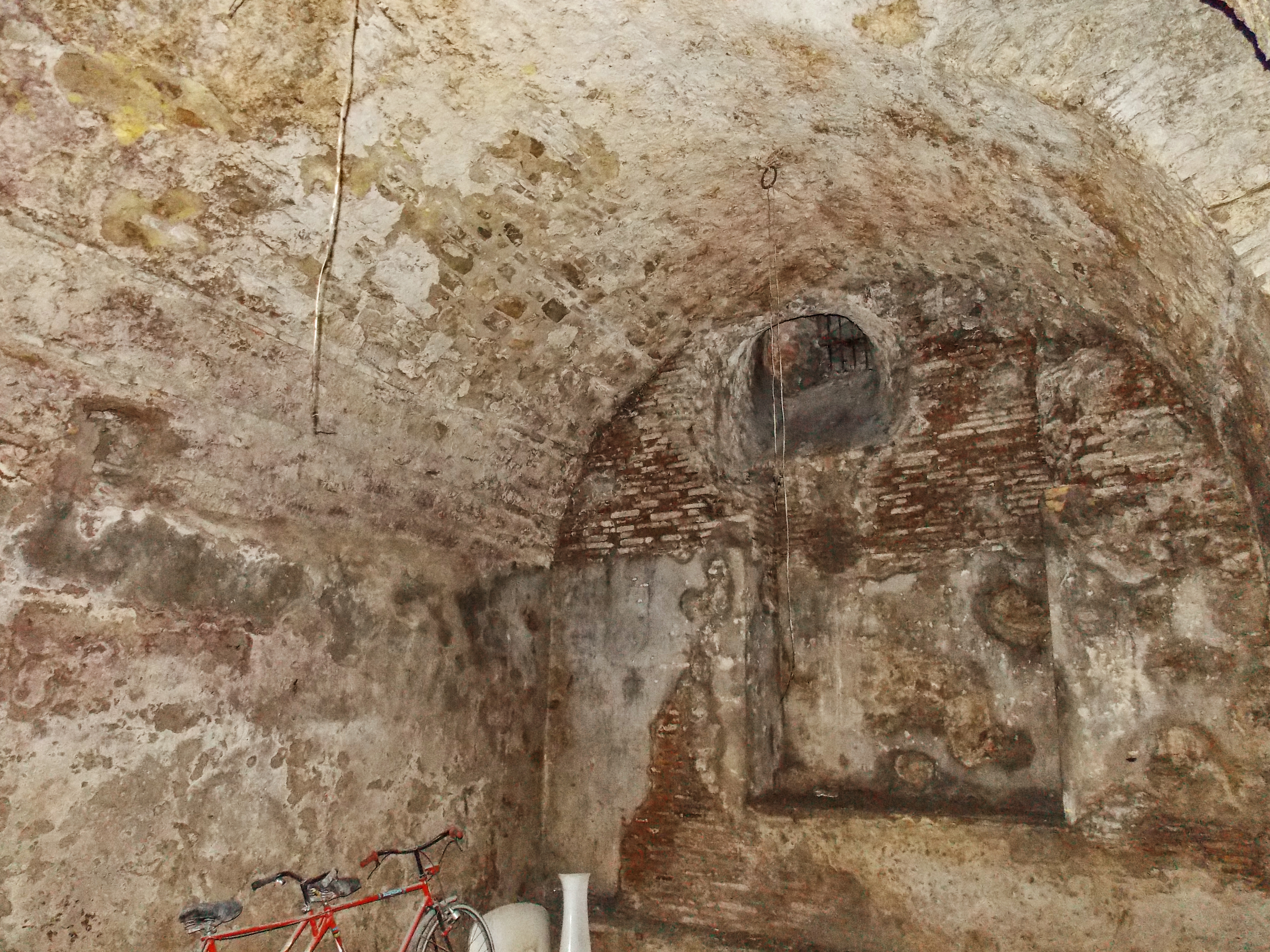 I resti delle terme romane di San Cristiano (II sec. d.C.) nel rione Triggio a Benevento: ambiente sotterraneo a volta